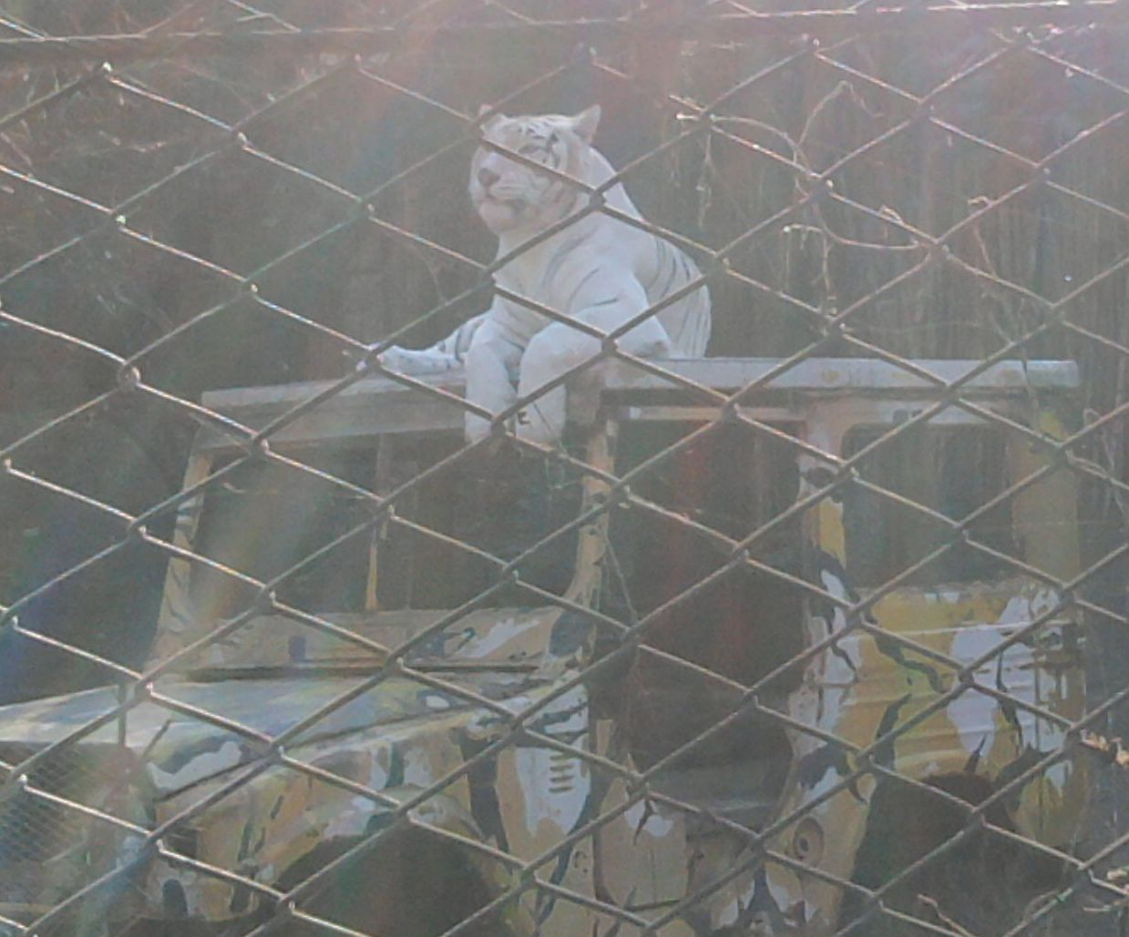 Imagen recortada